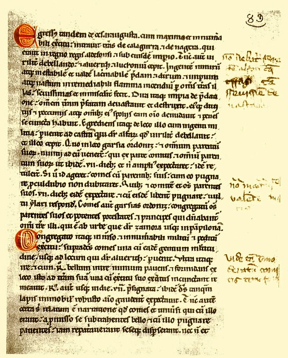 Historia Roderici Ms.9/4922 Real Academia de la Historia, f.89r (España)